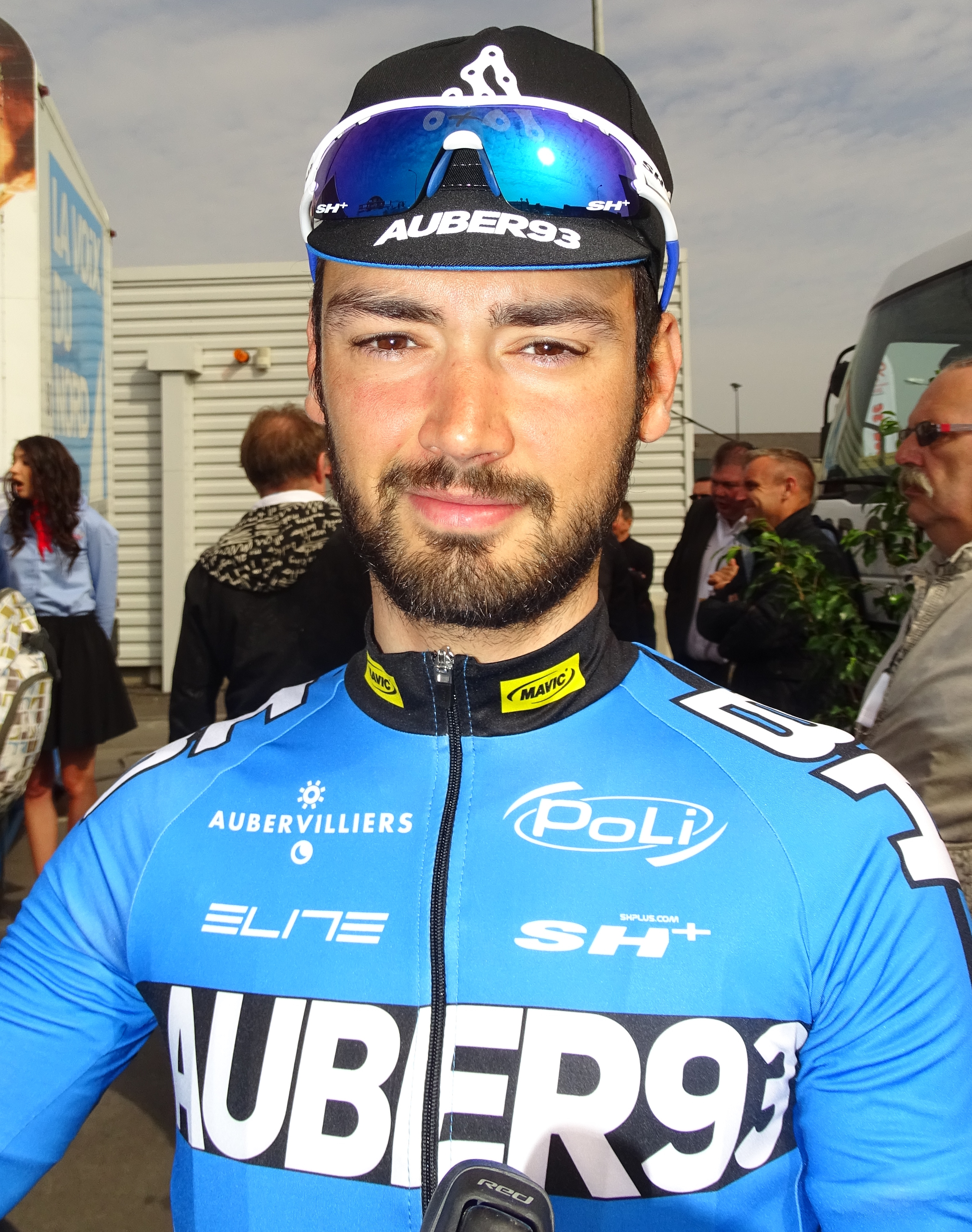 Reportage réalisé le jeudi 16 avril à l'occasion du départ et de l'arrivée du Grand Prix de Denain 2015 à Denain, Nord, Nord-Pas-de-Calais, France.